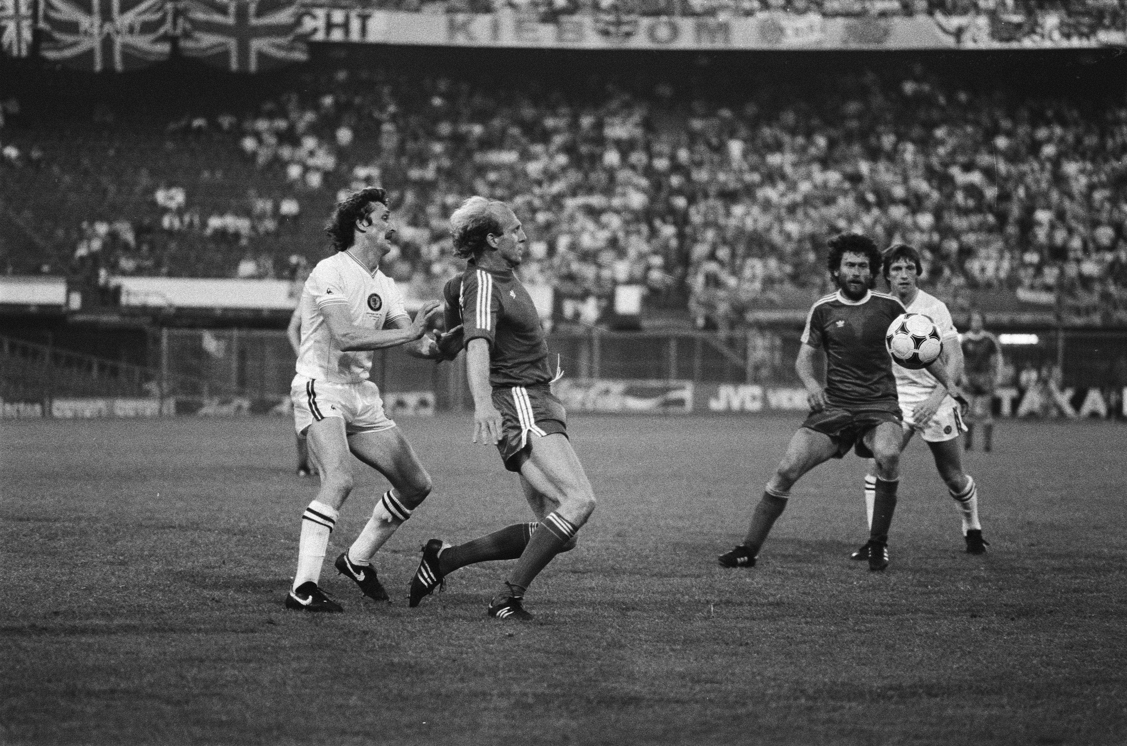 Rotterdam, 26 mei 1982. FC Bayern Munchen tegen Aston Villa 0-1 Europa Cup I; tweede van links Hoeness, derde van links Breitner in aktie.